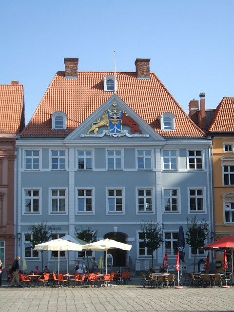 Stralsund, Germany, Commandantenhus am Alten Markt